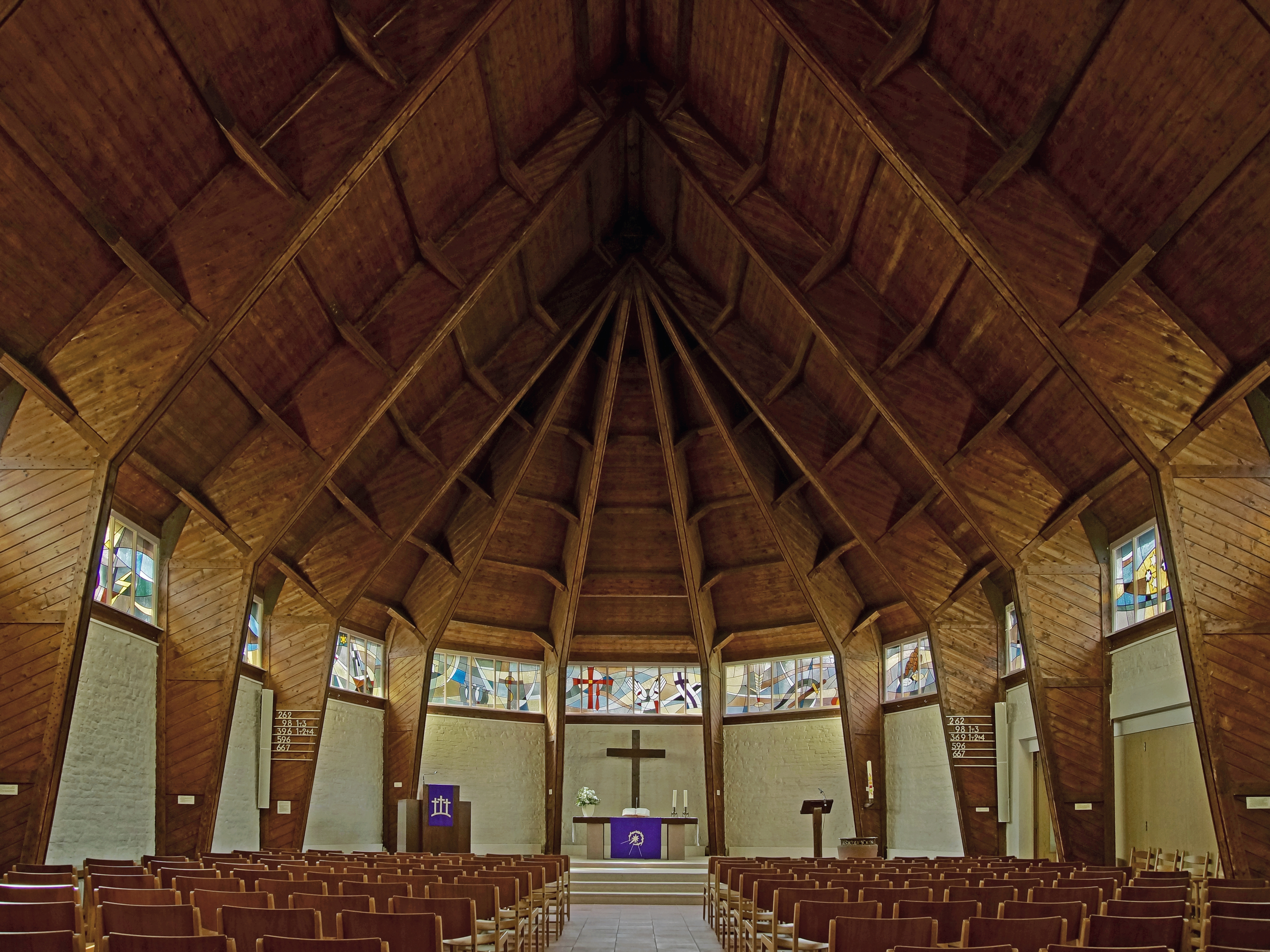 Die Johanneskirche liegt im Süden des Wuppertaler Stadtbezirks Elberfeld am Rande des von-der-Heydt-Parks, in der Nähe des Friedenshains. Als eine der 43 Notkirchen des Architekten Otto Bartning (1883–1959) wurde die Johanneskirche 1948/1949 nach dem Notkirchenprogramm des Evangelischen Hilfswerks für die von schweren Kriegsschäden betroffene Evangelisch-lutherische Gemeinde Elberfeld erbaut. Finanziert wurde der Bau hauptsächlich durch Spenden der amerikanischen Sektion des Lutherischen Weltbundes. Die Johanneskirche wurde am 17. April 1949 als erster Kirchenneubau Wuppertals nach dem Zweiten Weltkrieg eingeweiht. Signifikantes Merkmal ihrer reduktionistischen Architektur ist die zeltartige (präfabrizierte) Dreigelenkbinderkonstruktion aus Holz und ein vorwiegend aus Trümmersteinen errichtetes Mauerwerk. Der Grundriss entspricht dem Typ B des Notkirchenprogramms mit 5/10-Chorschluss. 1963 wurde die farblose Verglasung des umlaufenden Fensterbandes durch Glasmalereien mit symbolhaften Motiven aus dem Johannesevangelium und der Apokalypse sowie freien Farbkompositionen ersetzt. Die Bedeutung Bartnings liegt unbestritten in seinem Beitrag zur Entwicklung des modernen protestantischen Kirchenbaus. Bartning sah den Kirchenbau als klar umrissene Bauaufgabe an und hat sich sowohl mit dessen räumlicher Gestaltung als auch mit der Problematik von Technik und Materialien theoretisch und praktisch auseinandergesetzt. Erhaltung und Nutzung liegen daher gemäß § 2 (1) DSchG aus städtebaulichen, wissenschaftlichen und stadthistorischen Gründen im öffentlichen Interesse. Die Unterschutzstellung erstreckt sich auf das gesamte Gebäude. This is a photograph of an architectural monument.